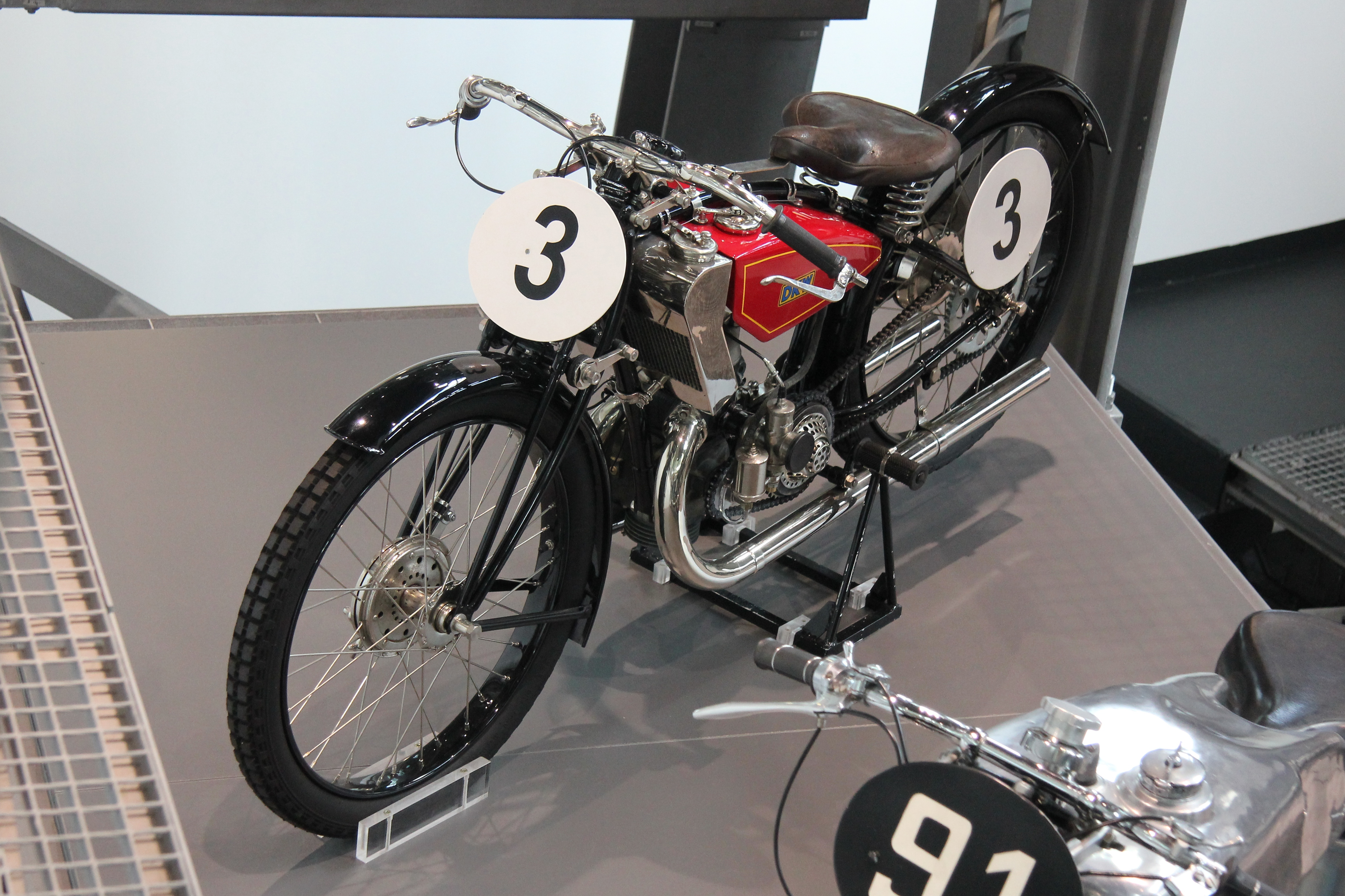 DKW ORE 250, Zweitaktmotor mit Ladepumpe, Baujahr 1929